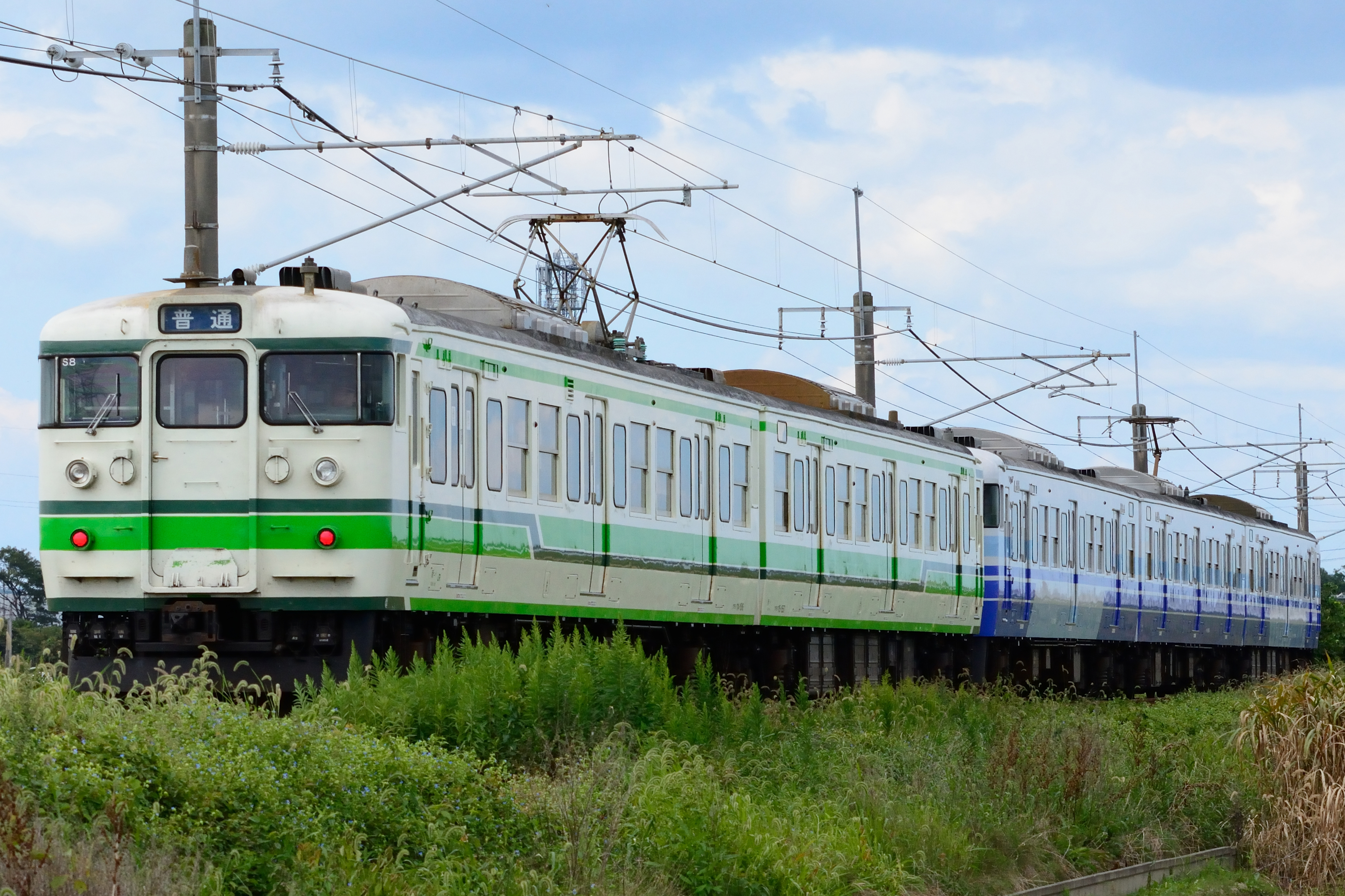 115系 新潟色